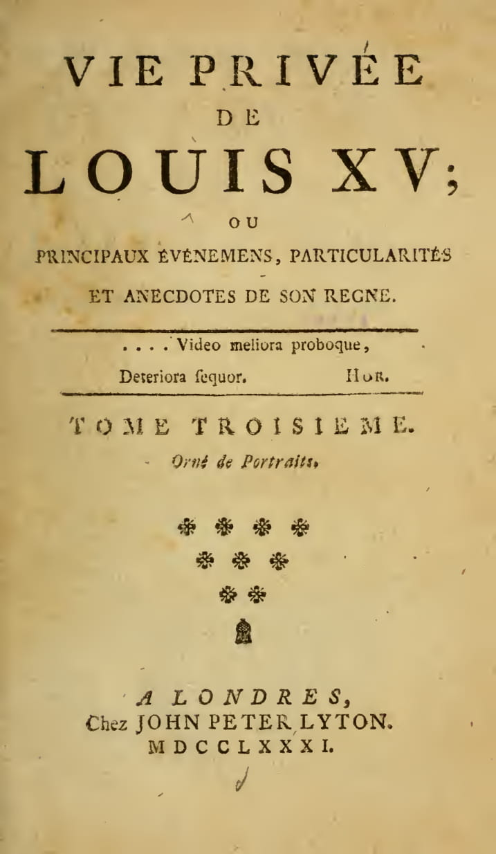 Capa do livro "Vie privee de Louis XV ou Principaux evenemens, particularites et anecdotes de son regne"